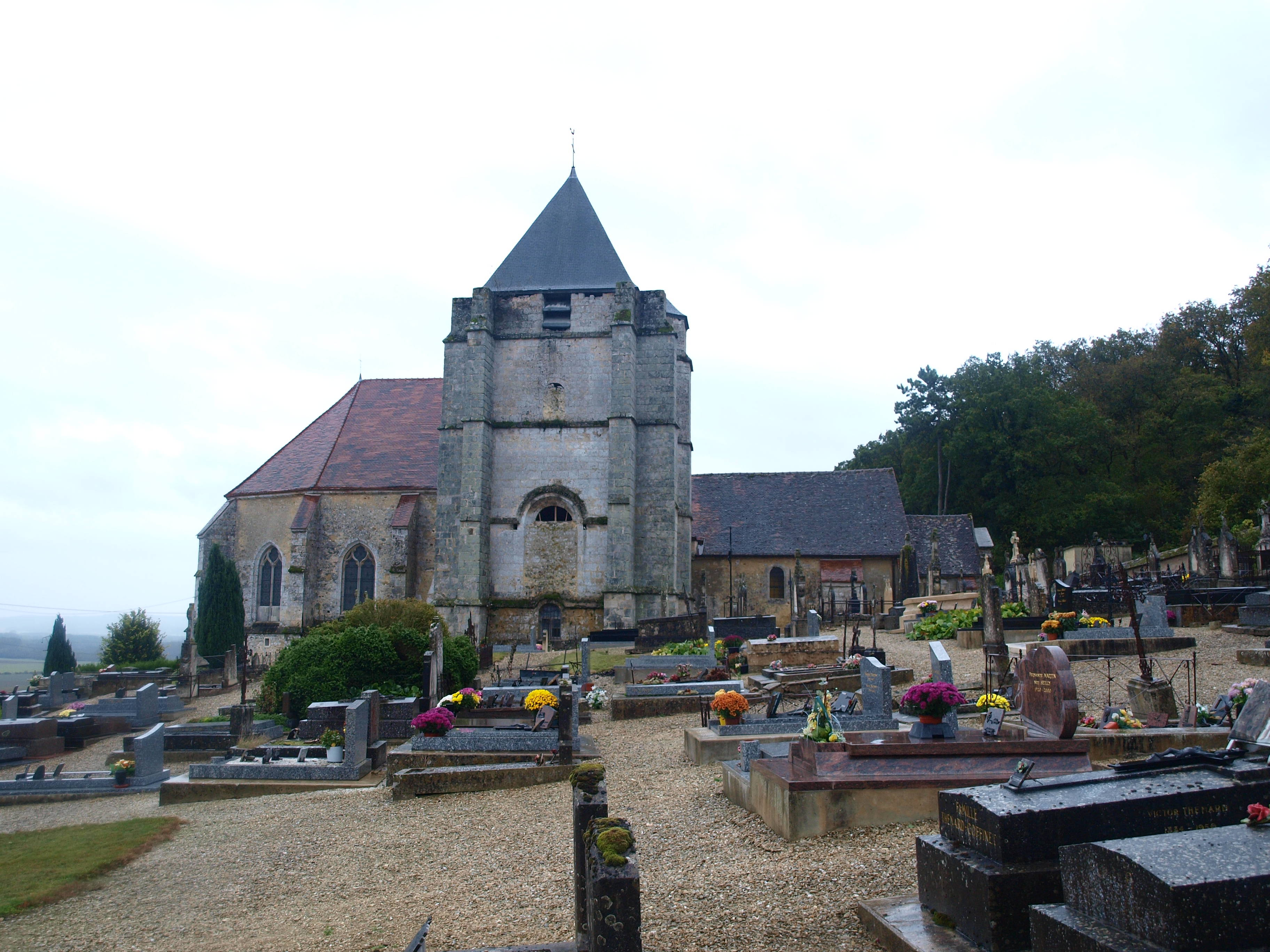 La Saulsotte (Aube, France) ; église